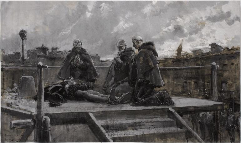 La obra representa la ejecución del justicia de Aragón Juan de Lanuza (1564-1591), que fue decapitado en Zaragoza en 1591 por orden del rey Felipe II de España.